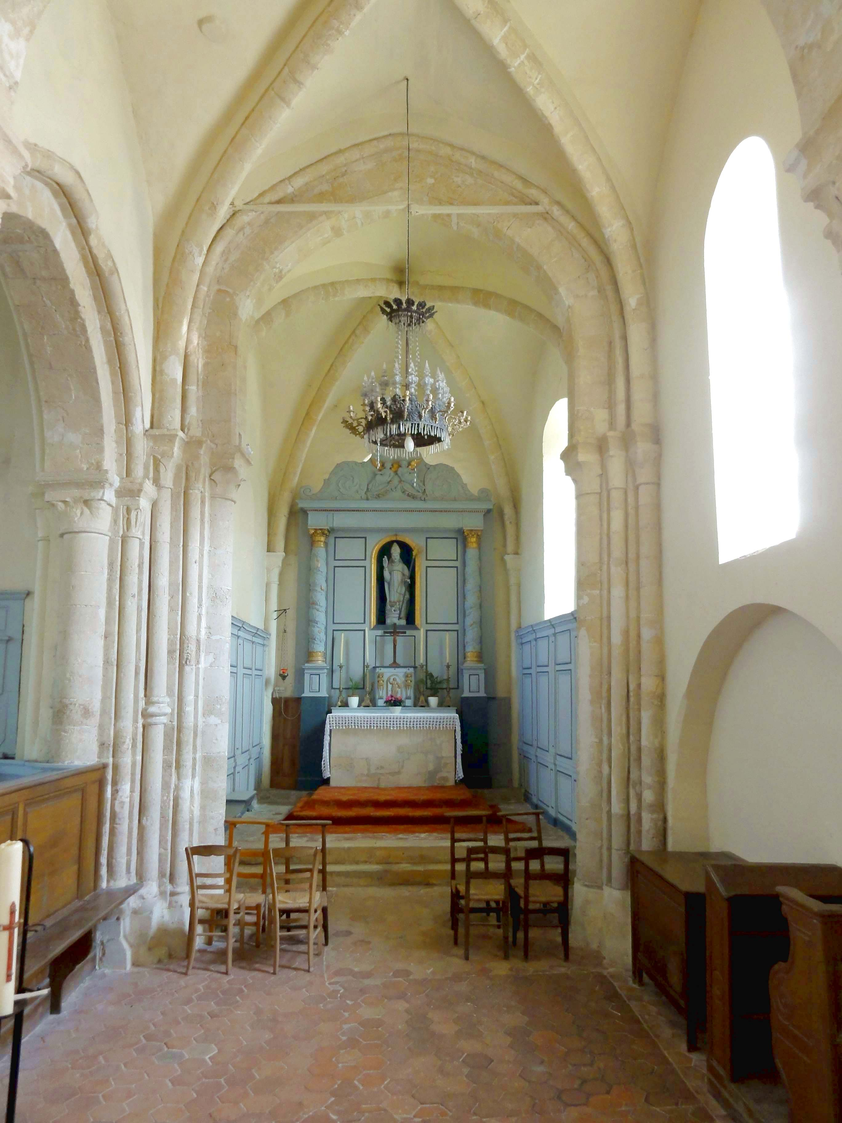 Intérieur de l'église - voir titre.